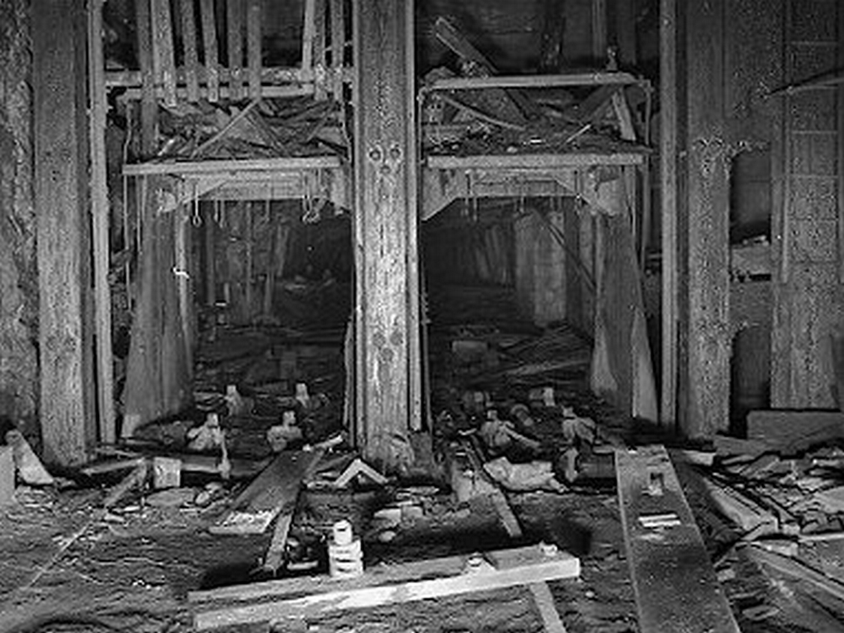 Voir Mines du Boulonnais